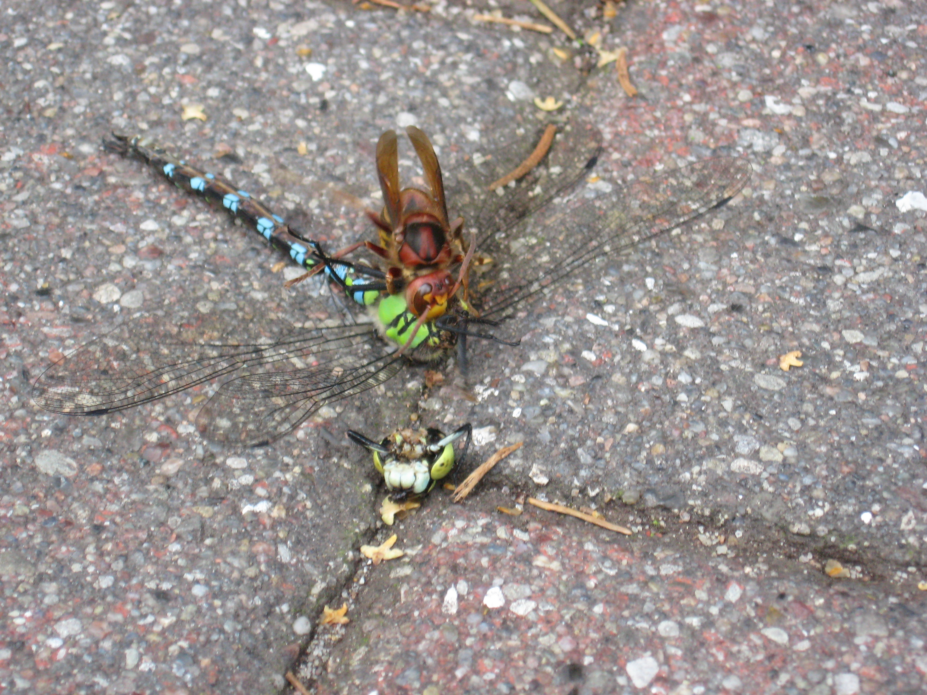 Hornisse (Vespa crabro) mit Libelle